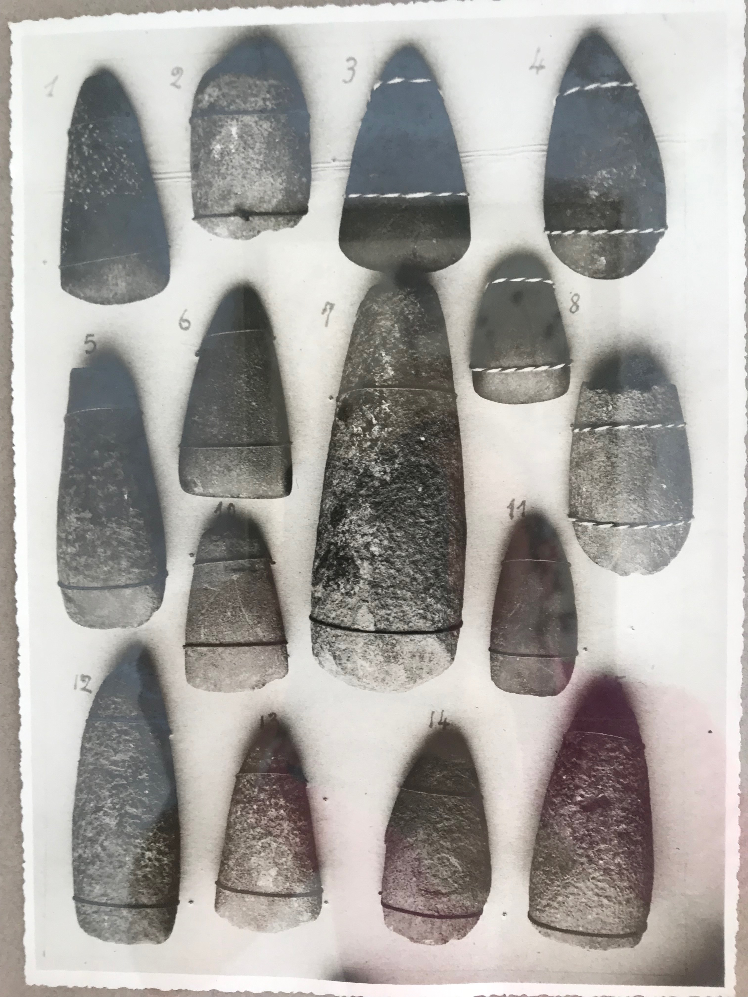 Destrals